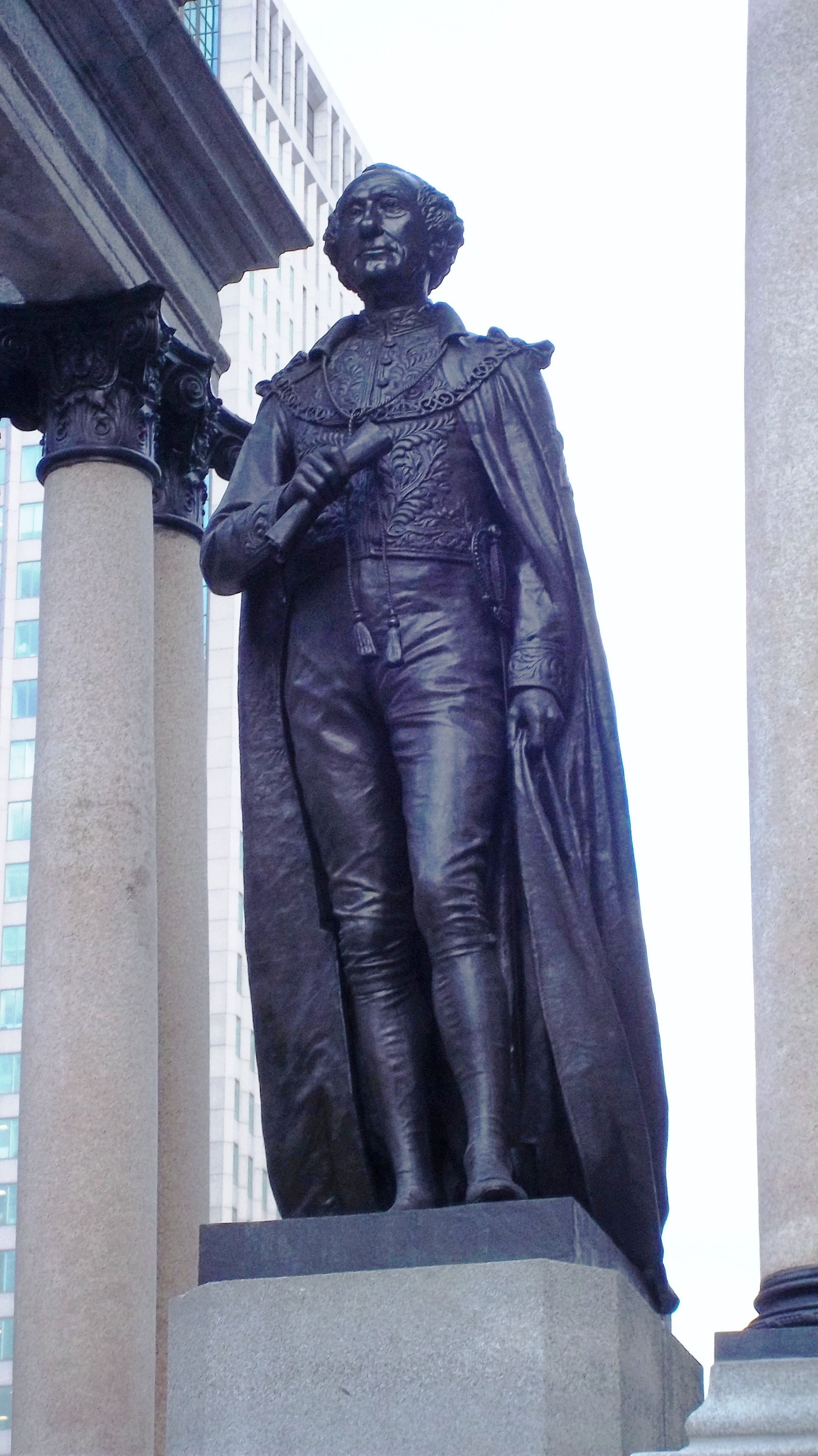 Monument à John A. Macdonald, Place du Canada, Montréal